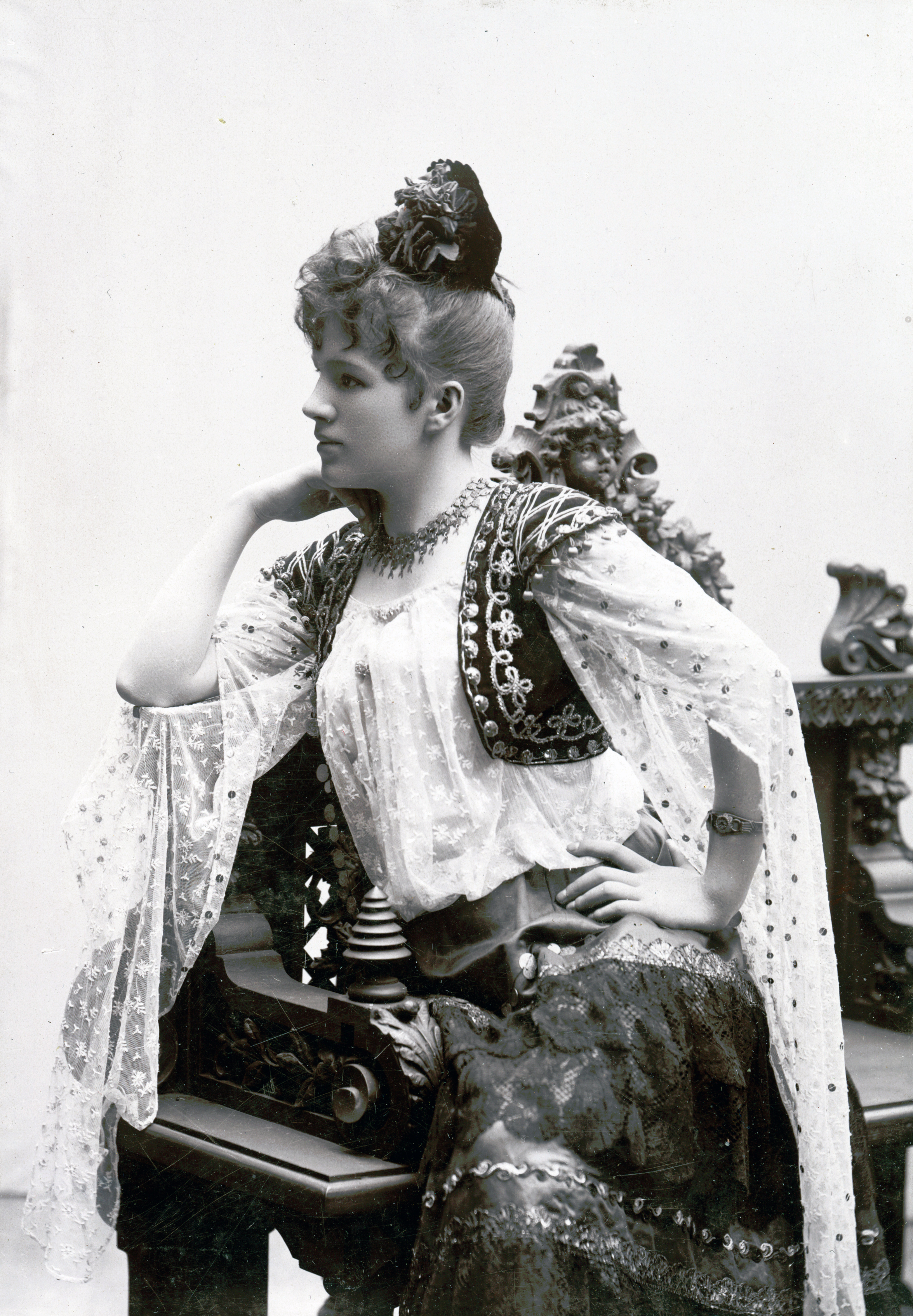 Edla Hamberg (gift Rothgardt) i titelrollen i Carmen, Stora teatern i Göteborg 1892